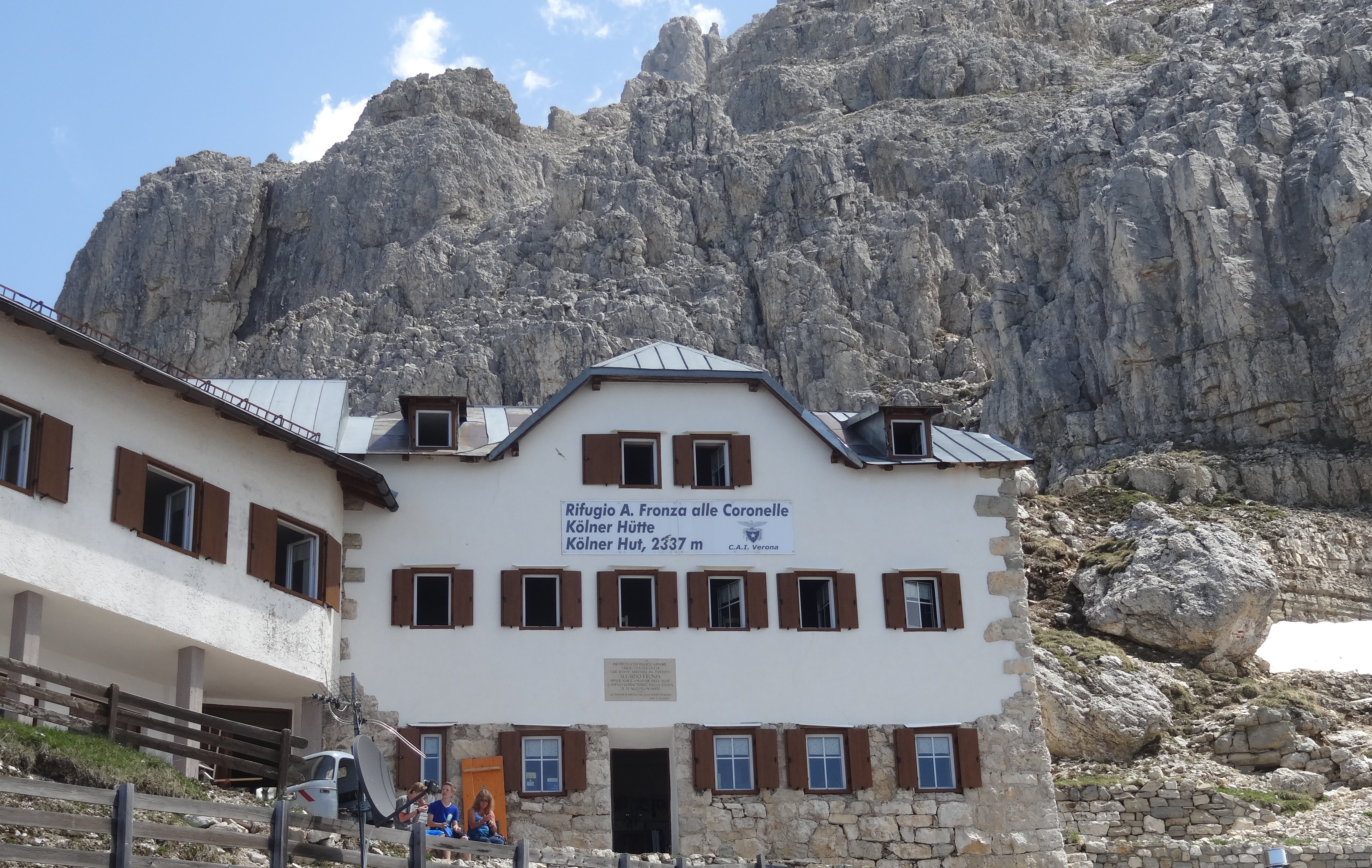 Kölner Hütte vor dem beeindruckenden Rosengartenmassiv